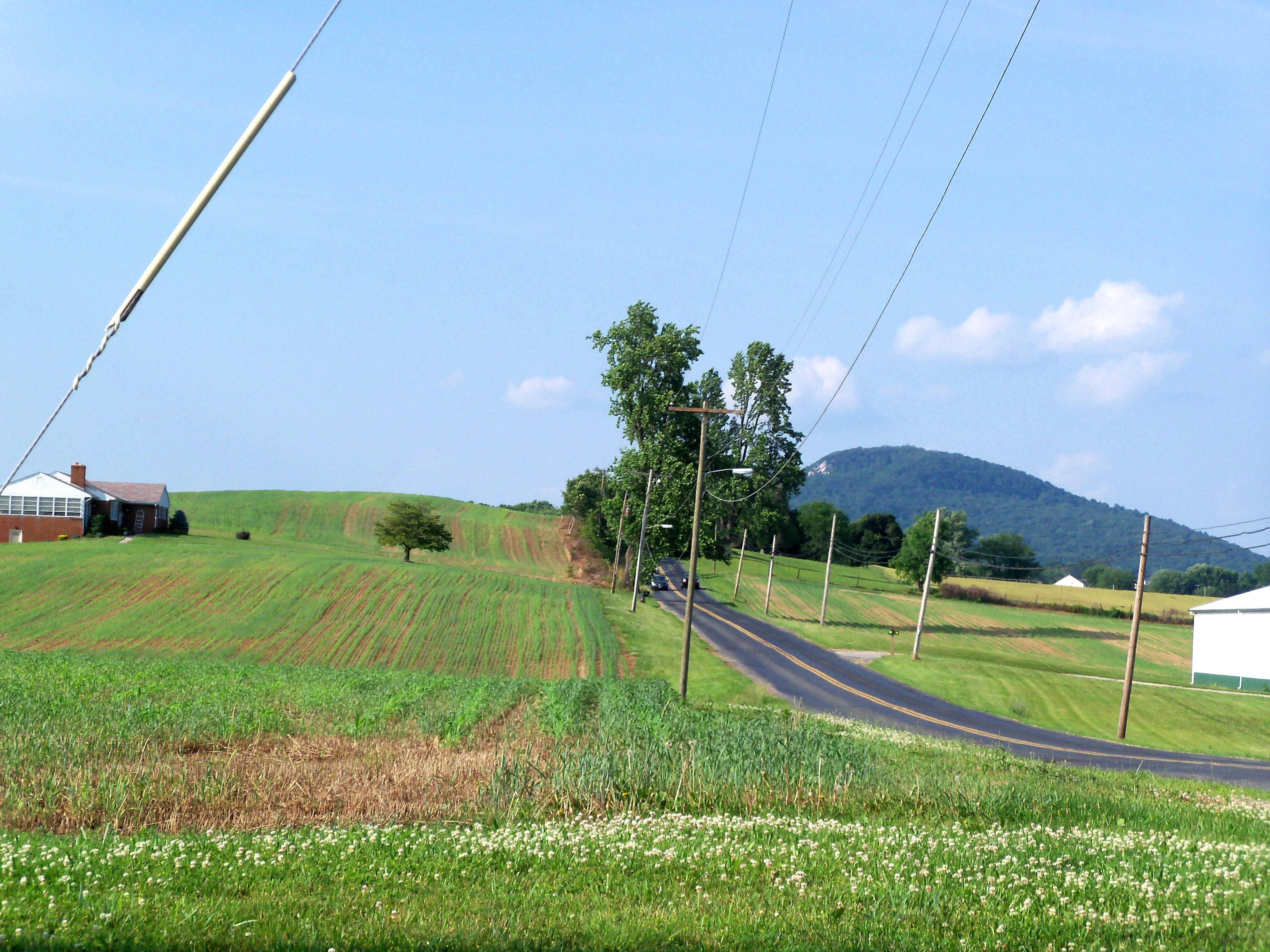 Dickerson, MD 20842, USA